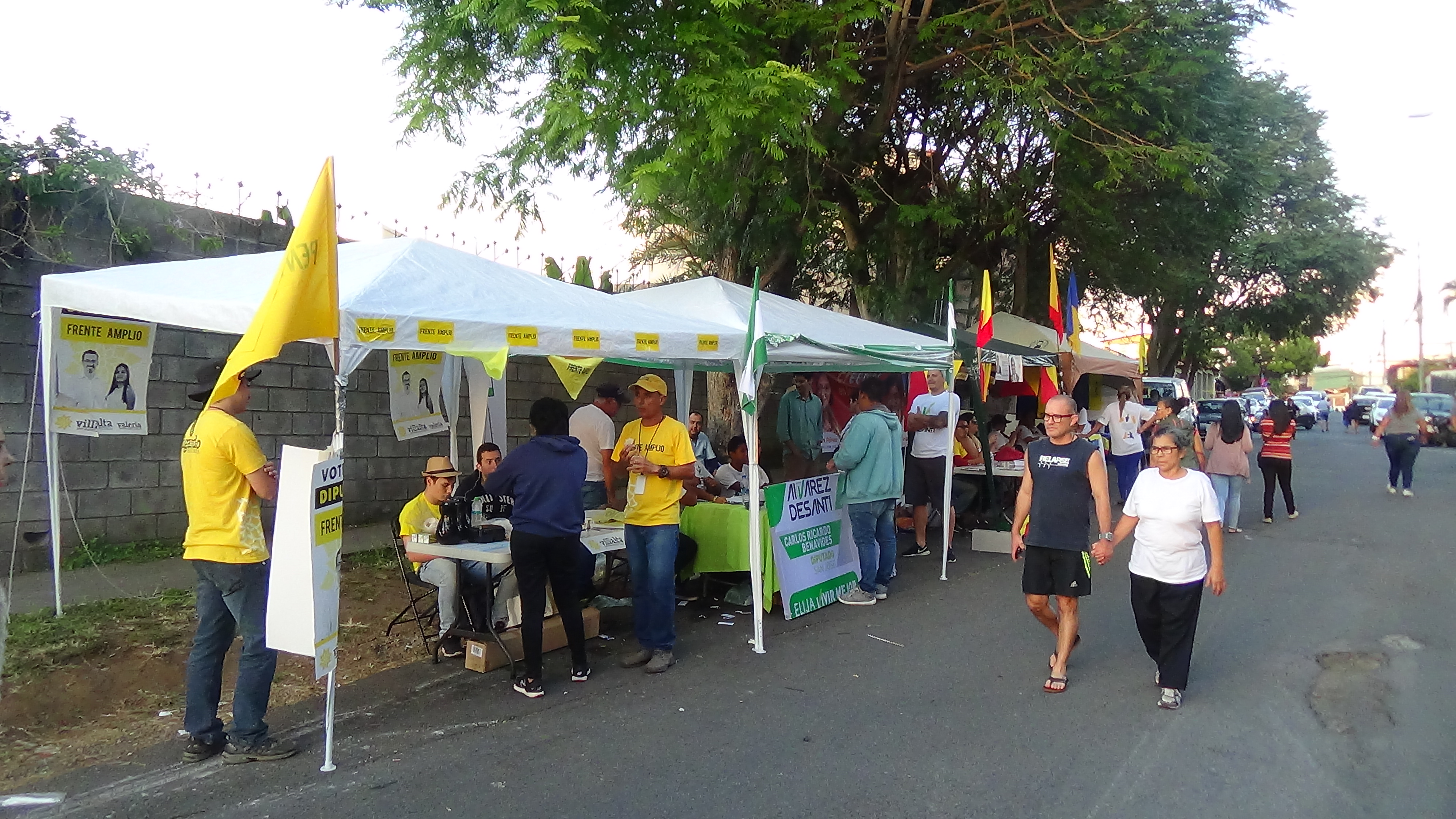 Varios stands partidadios en las afueras de la Universidad Hispanoamericana, elecciones 2019